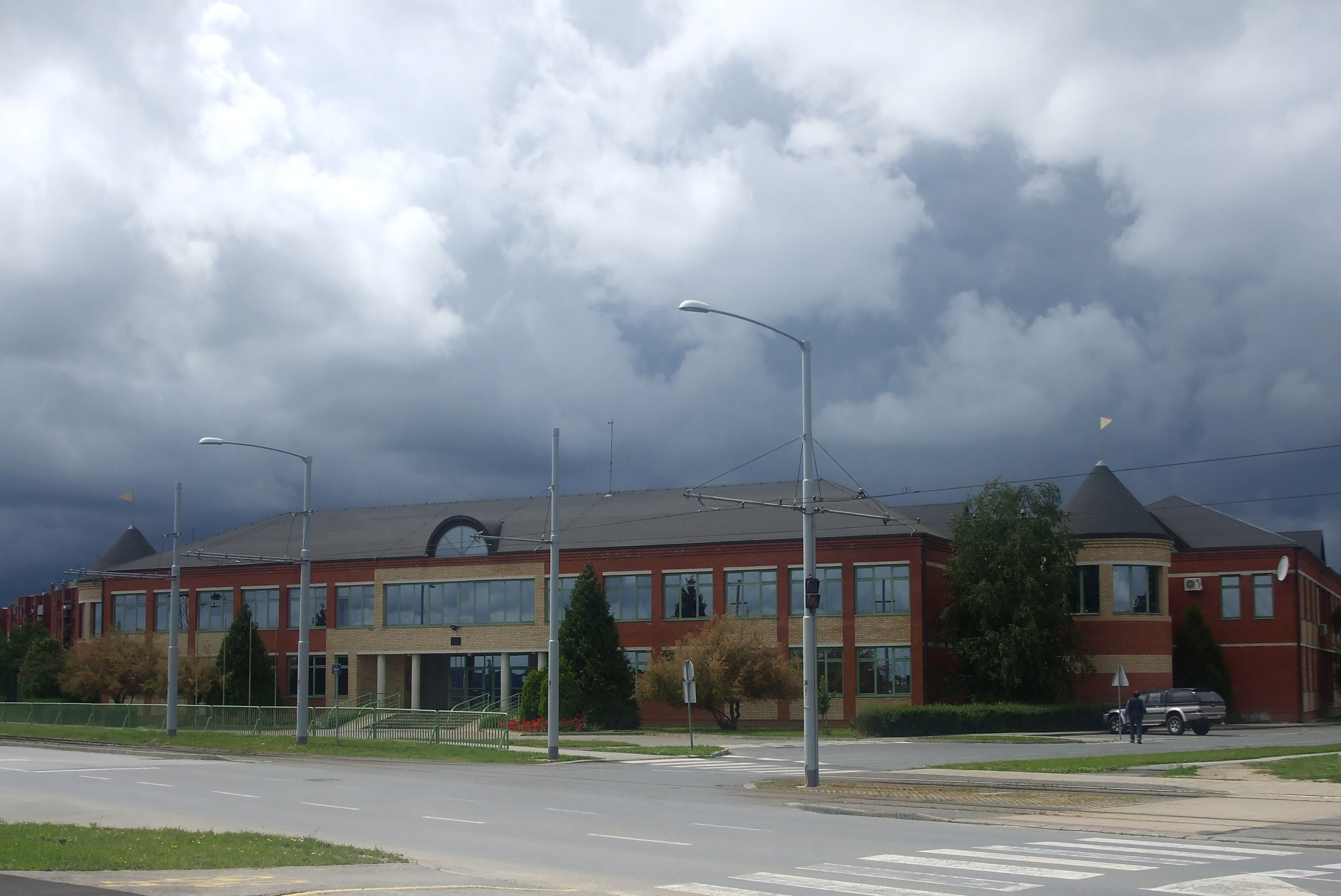 Prosvjetno-kulturni centar Mađara u Hrvatskoj u Gackoj ulici u Osijeku.